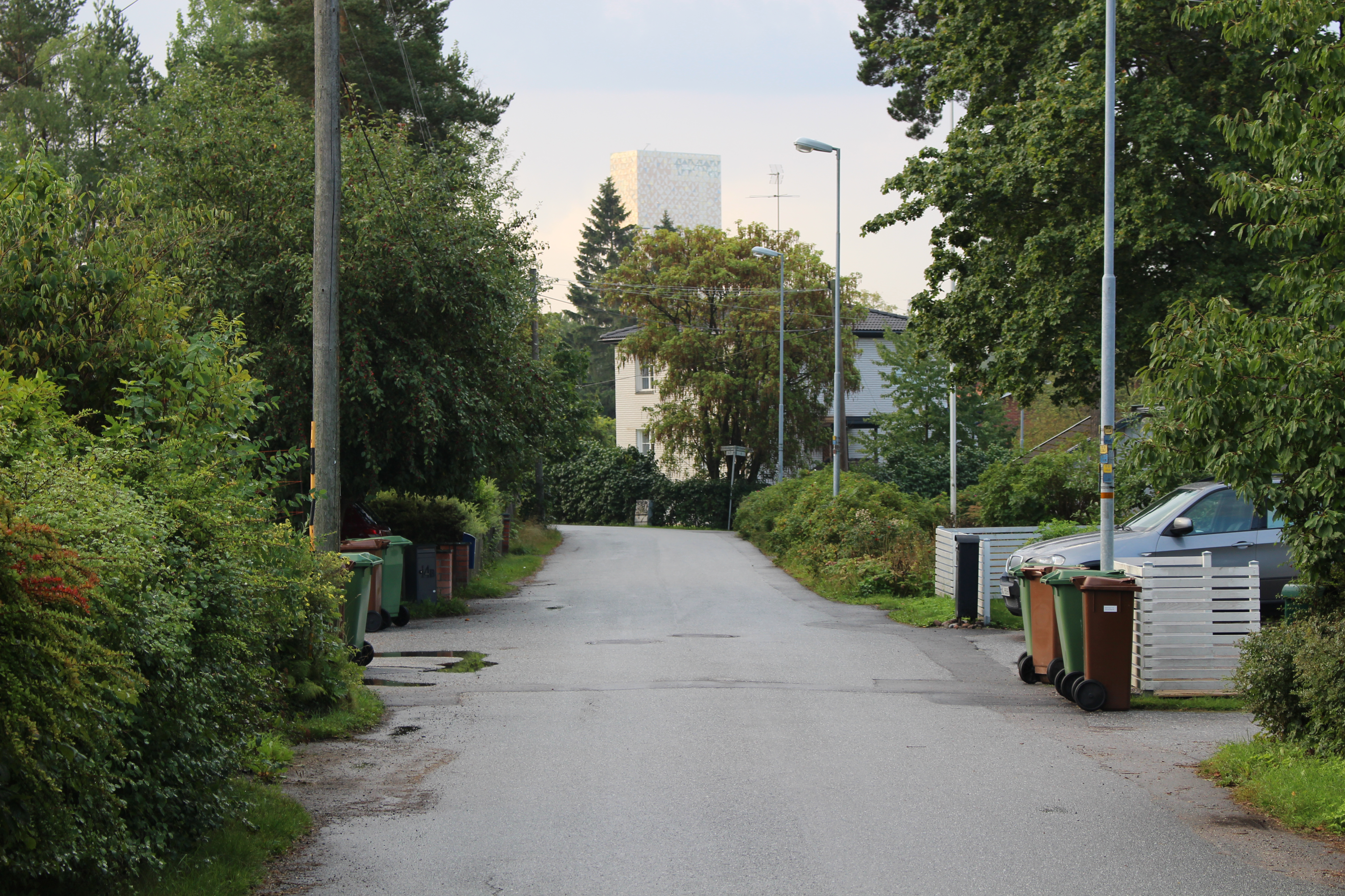 Björkvägen mot söder i området Eriksberg. Vy mot Victoria Tower.